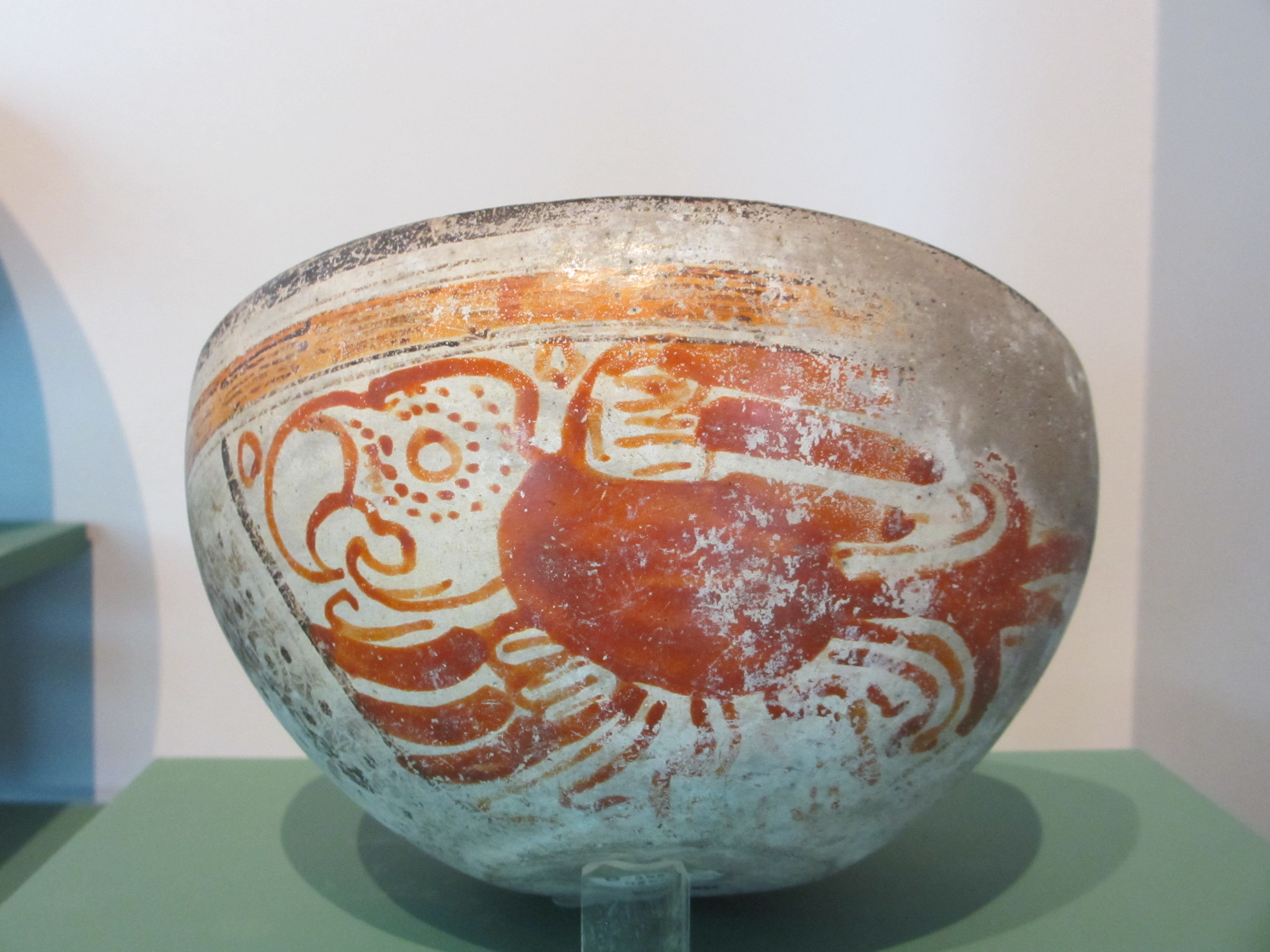 Vasija decorada. Cultura maya